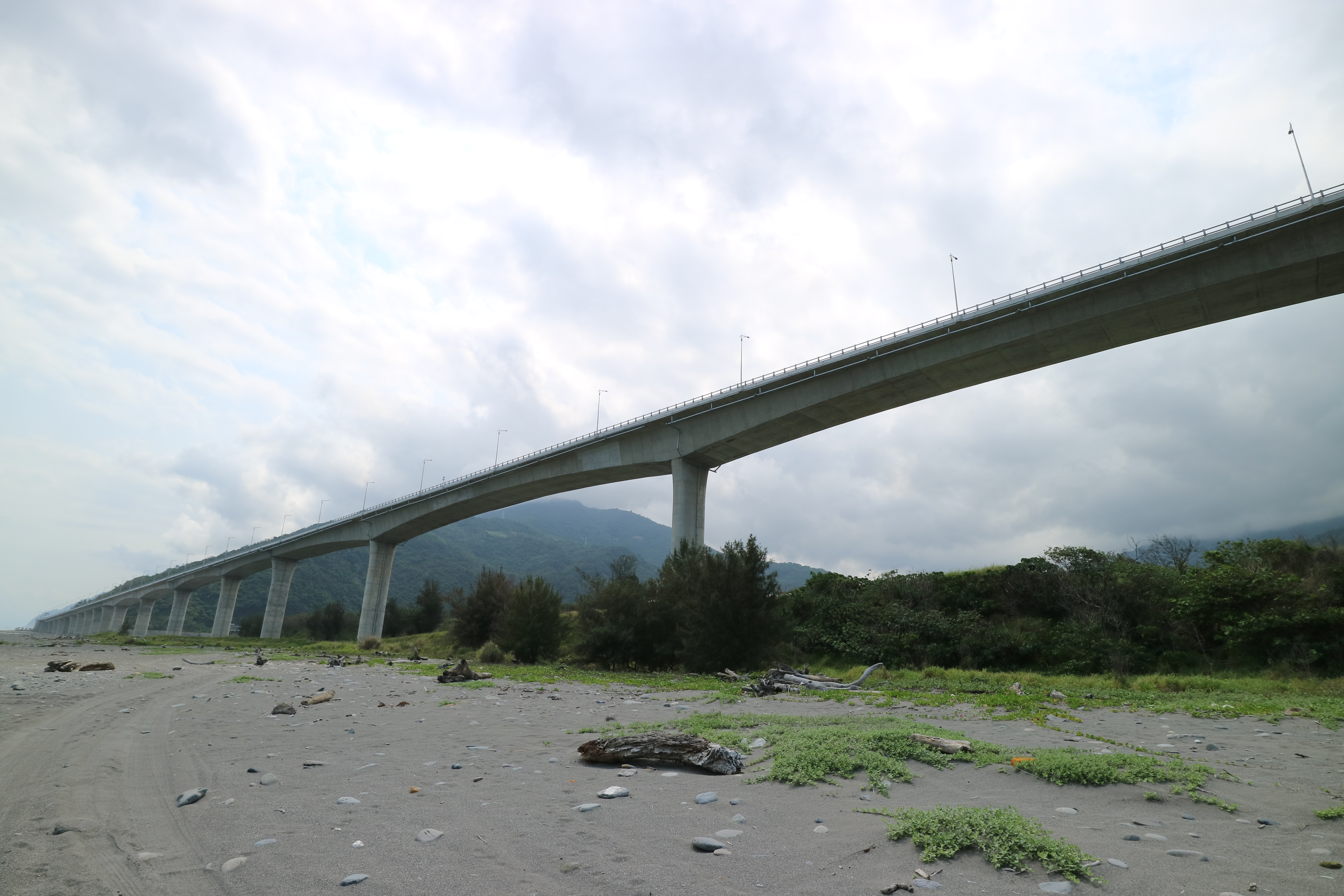 臺灣臺東金崙大橋